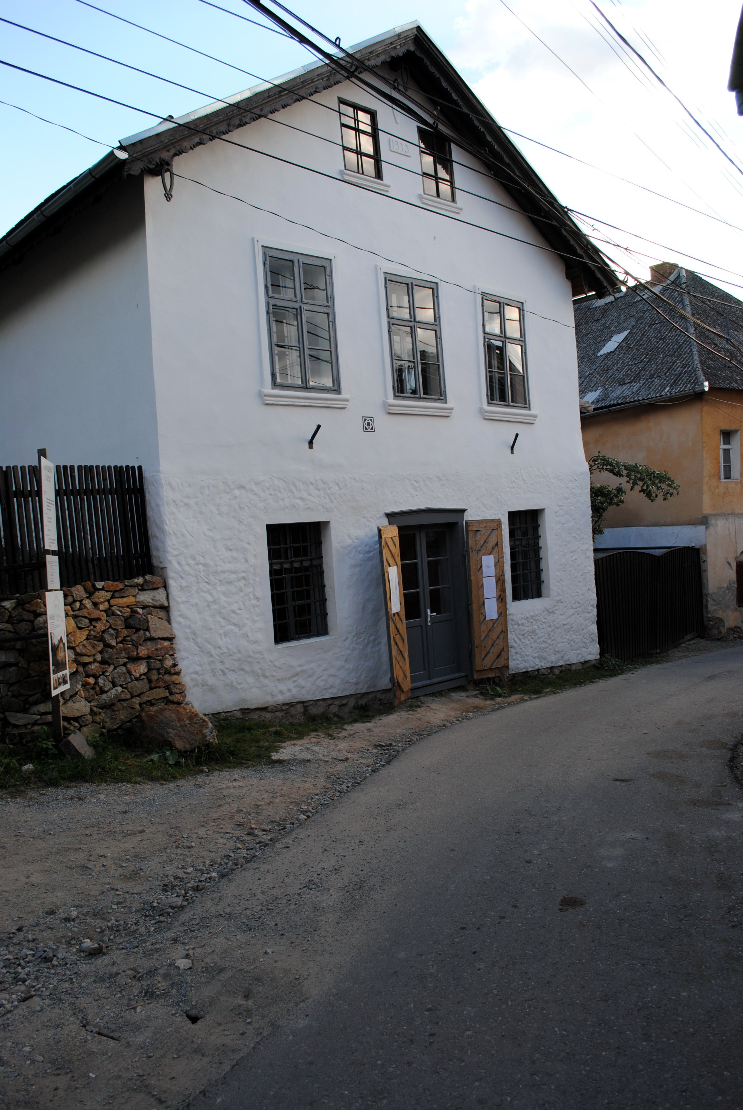 Casa parohială a parohiei unitariene